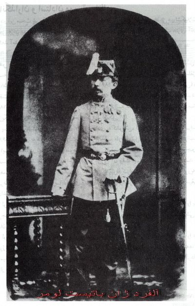 آلفرد ژان باتیست لومر